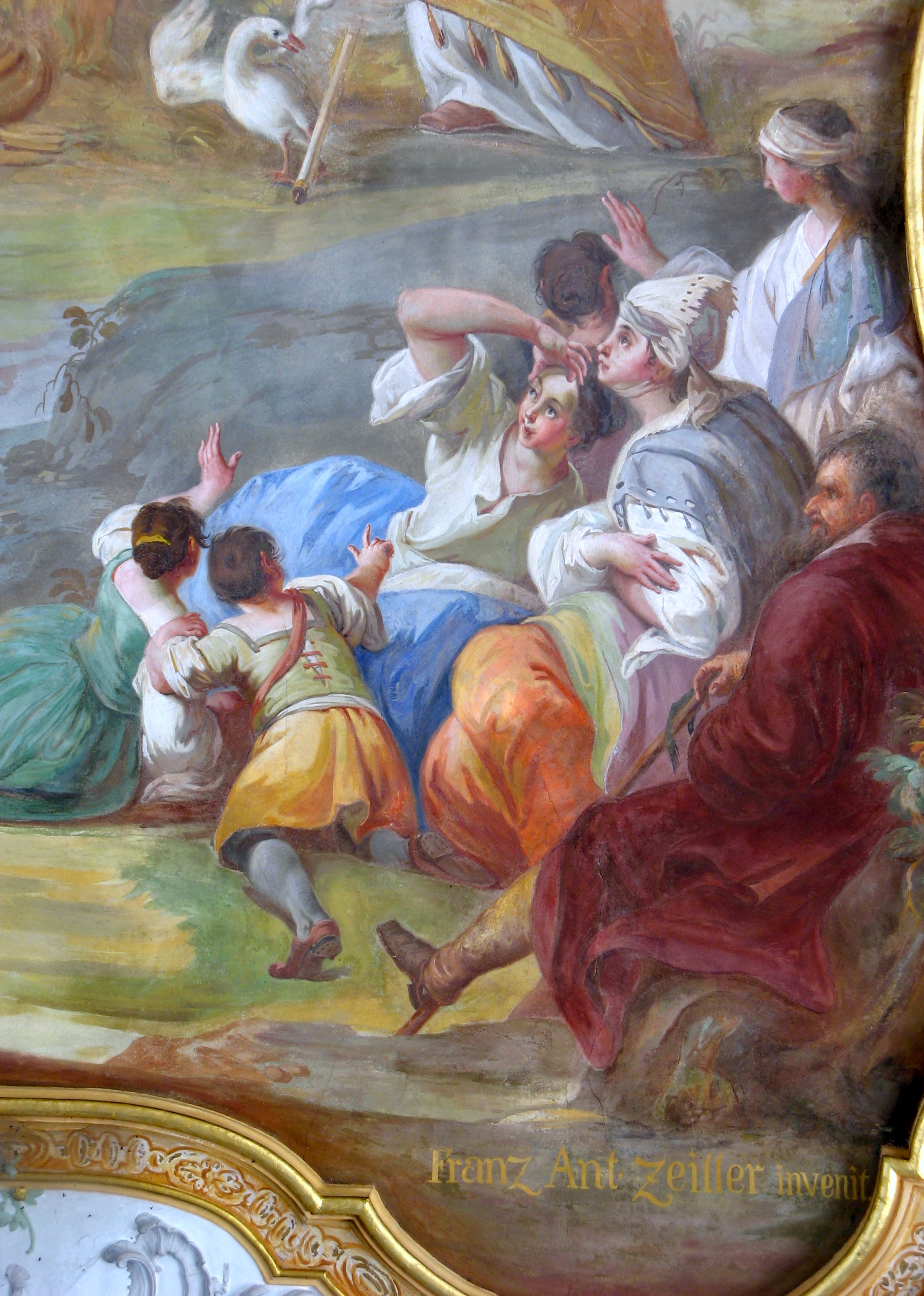 Detail aus dem Deckenfresko von Franz Anton Zeiller in der Kirche von Schlingen, 1763, mit Signatur